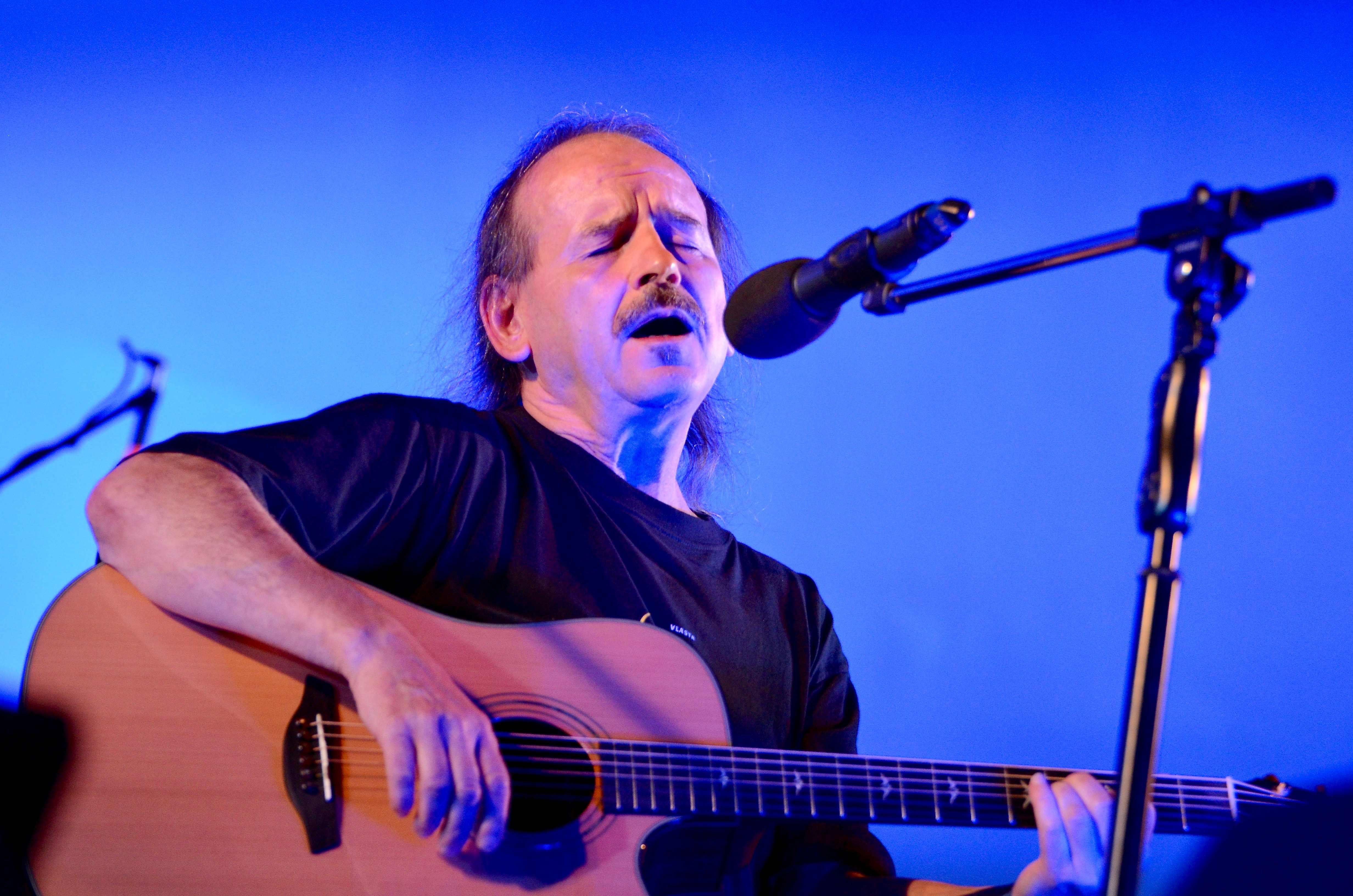 VR Valmez 2017